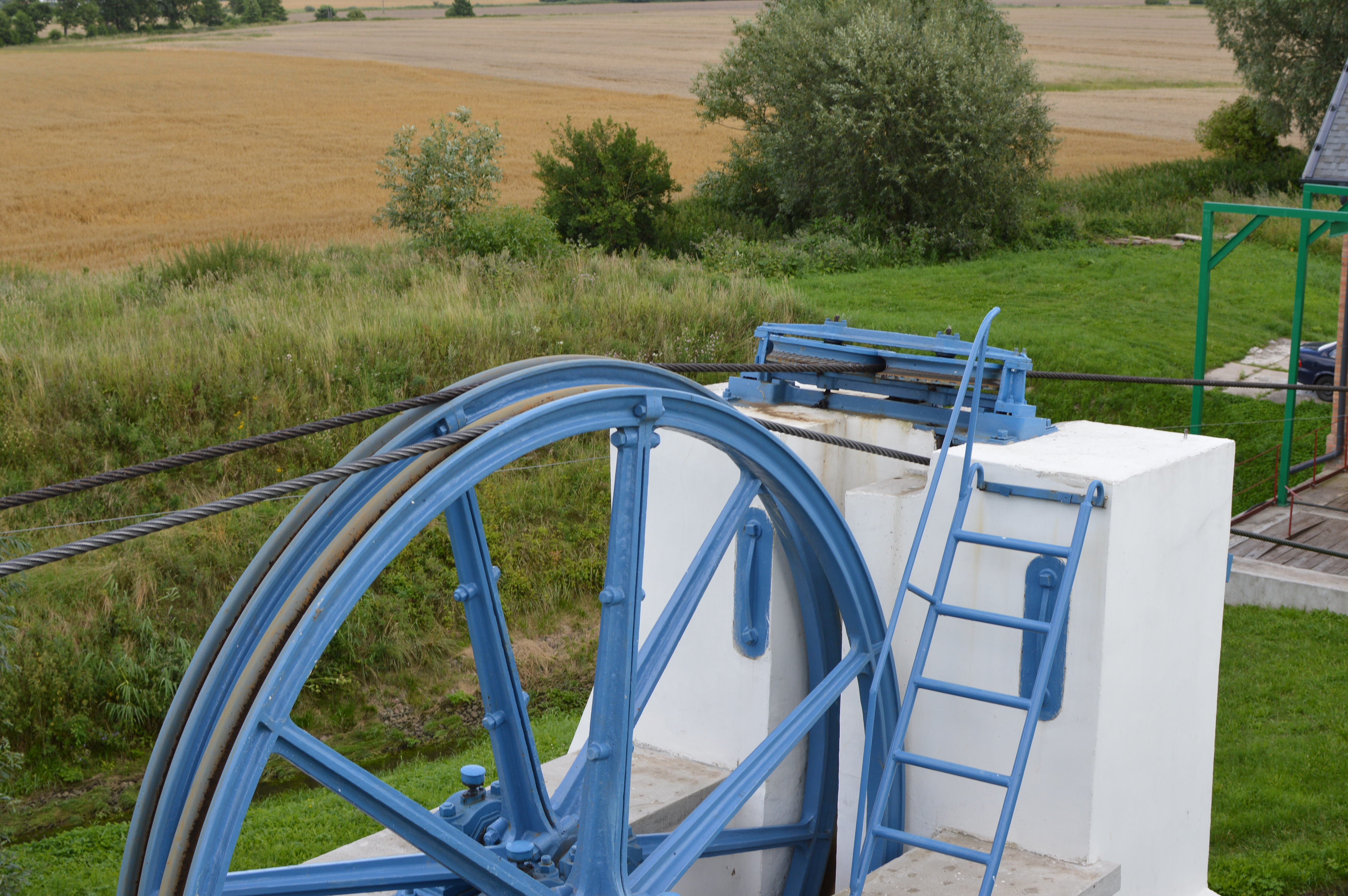 Pochylnia Nowy Całun w zespole Kanału Elbląskiego Wikidata has entry Q5637 with data related to this item.